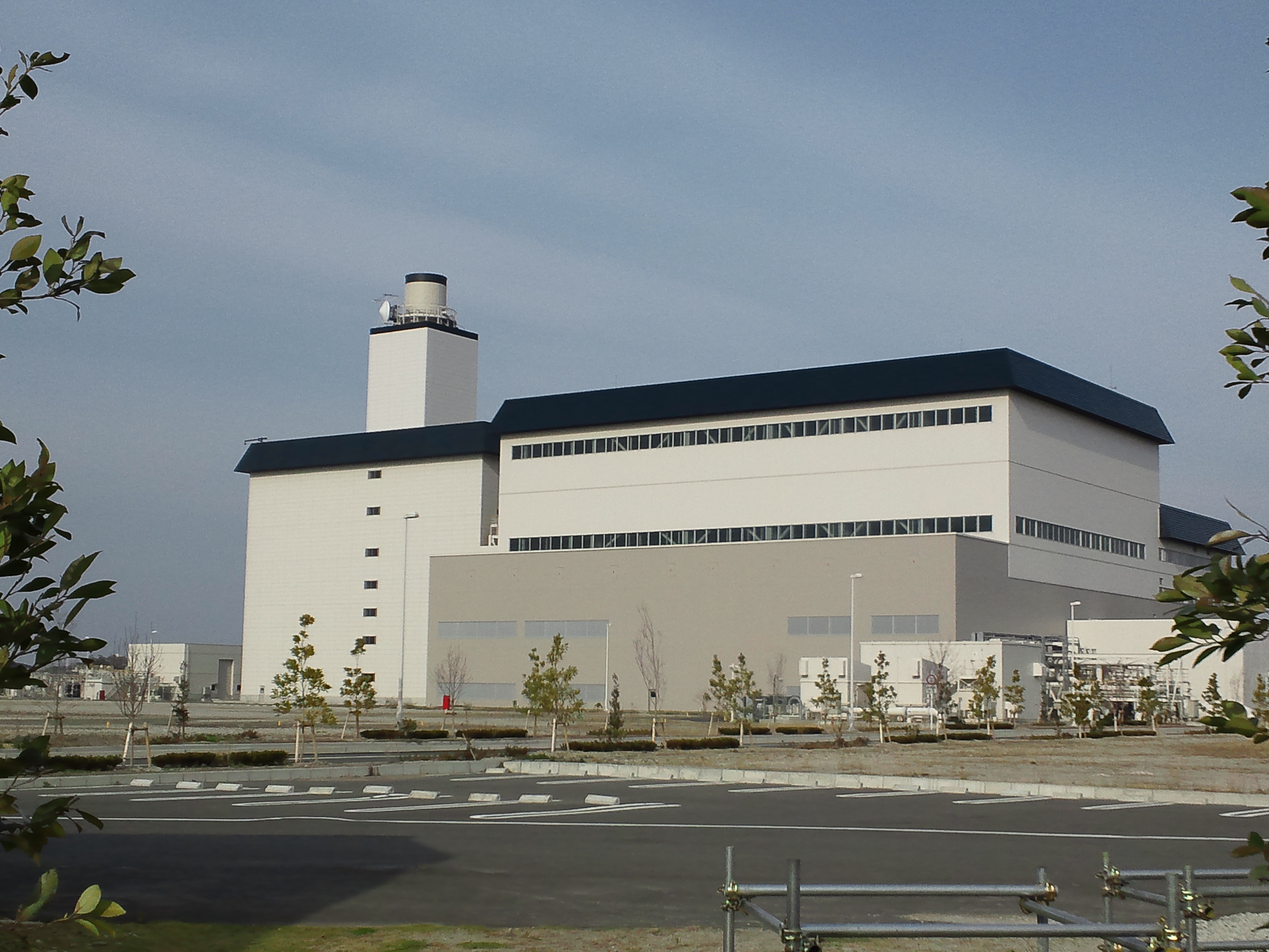 東北電力仙台火力発電所